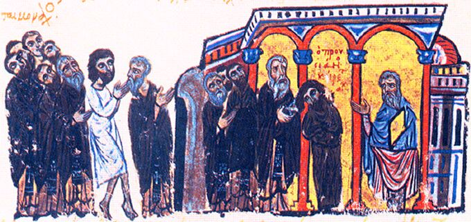 Prusians Tonsure